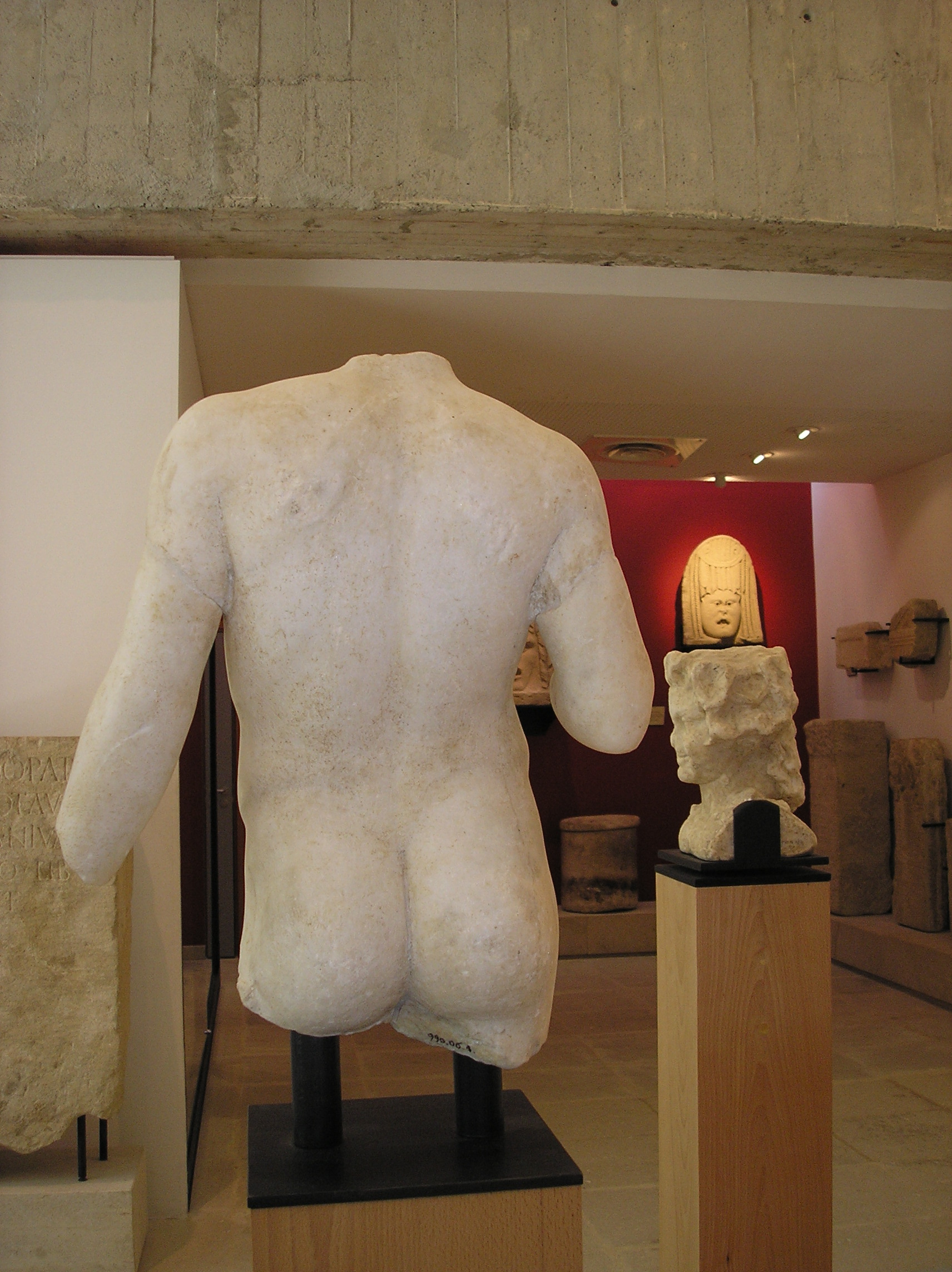 Achterzijde van een Romeins beeld van een jongeman (Antinoös?) in het Archeologisch Museum van Vaison-la-Romaine (Vaucluse/Frankrijk). Begin 2e eeuw na Christus, marmer.